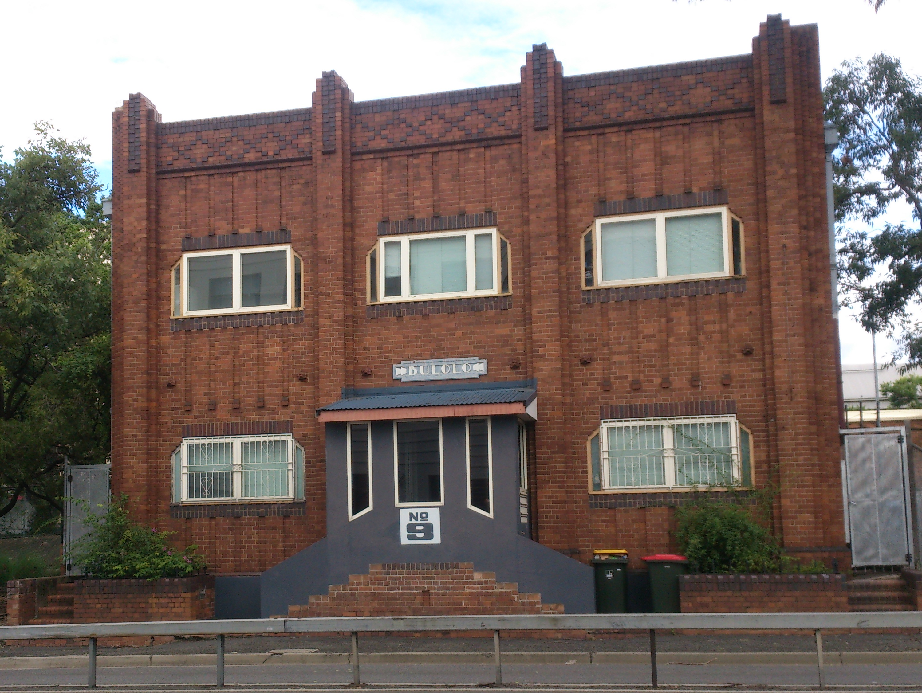 Bululo Flats, Fortitude Vally, 2015